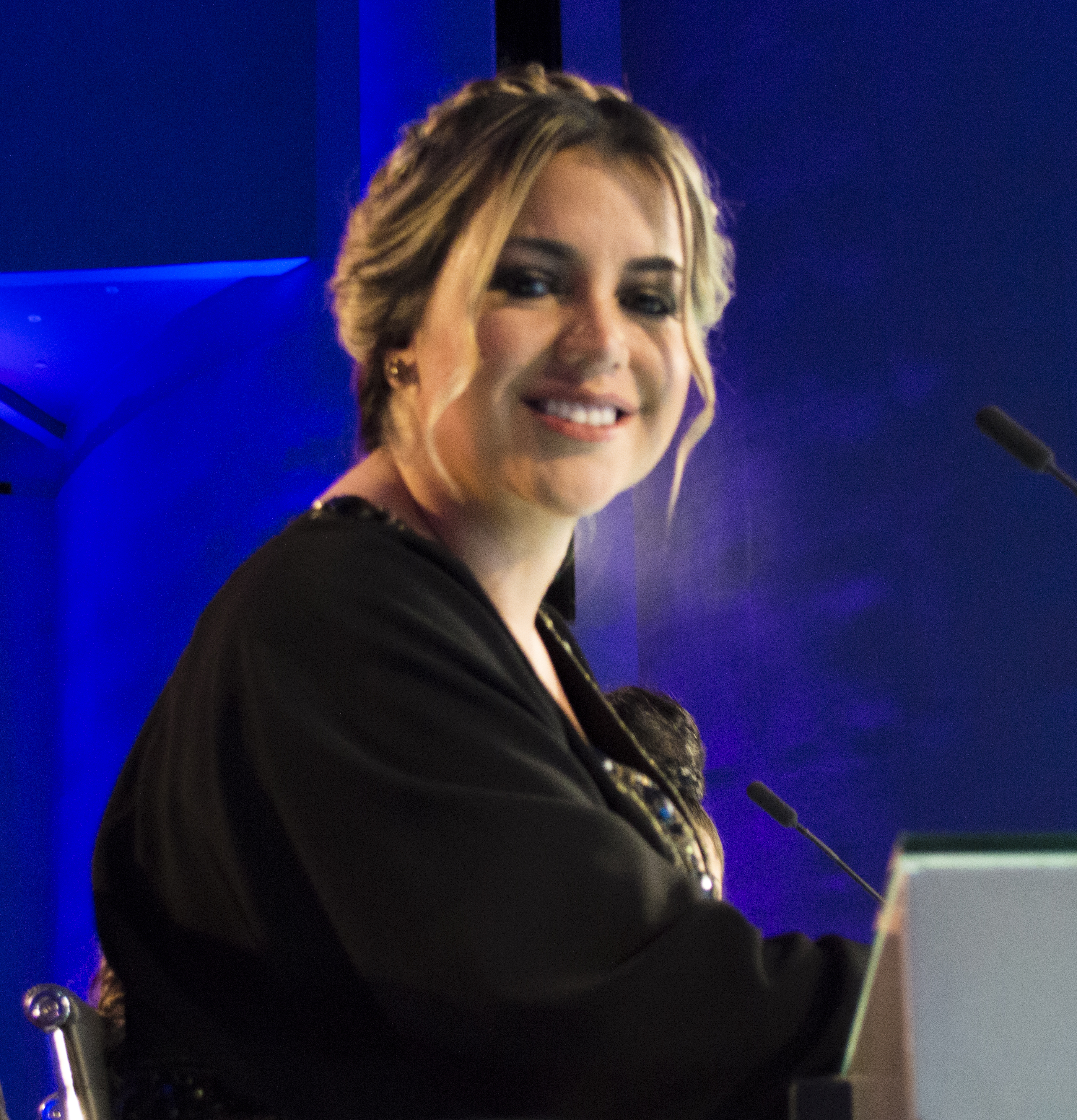 Wendy Vera como jurado de Ecuador Tiene Talento 3 el 26 de octubre de 2014.